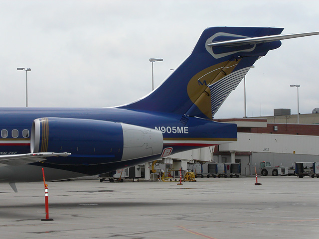 Midwest Airlines Boeing 717 N905ME